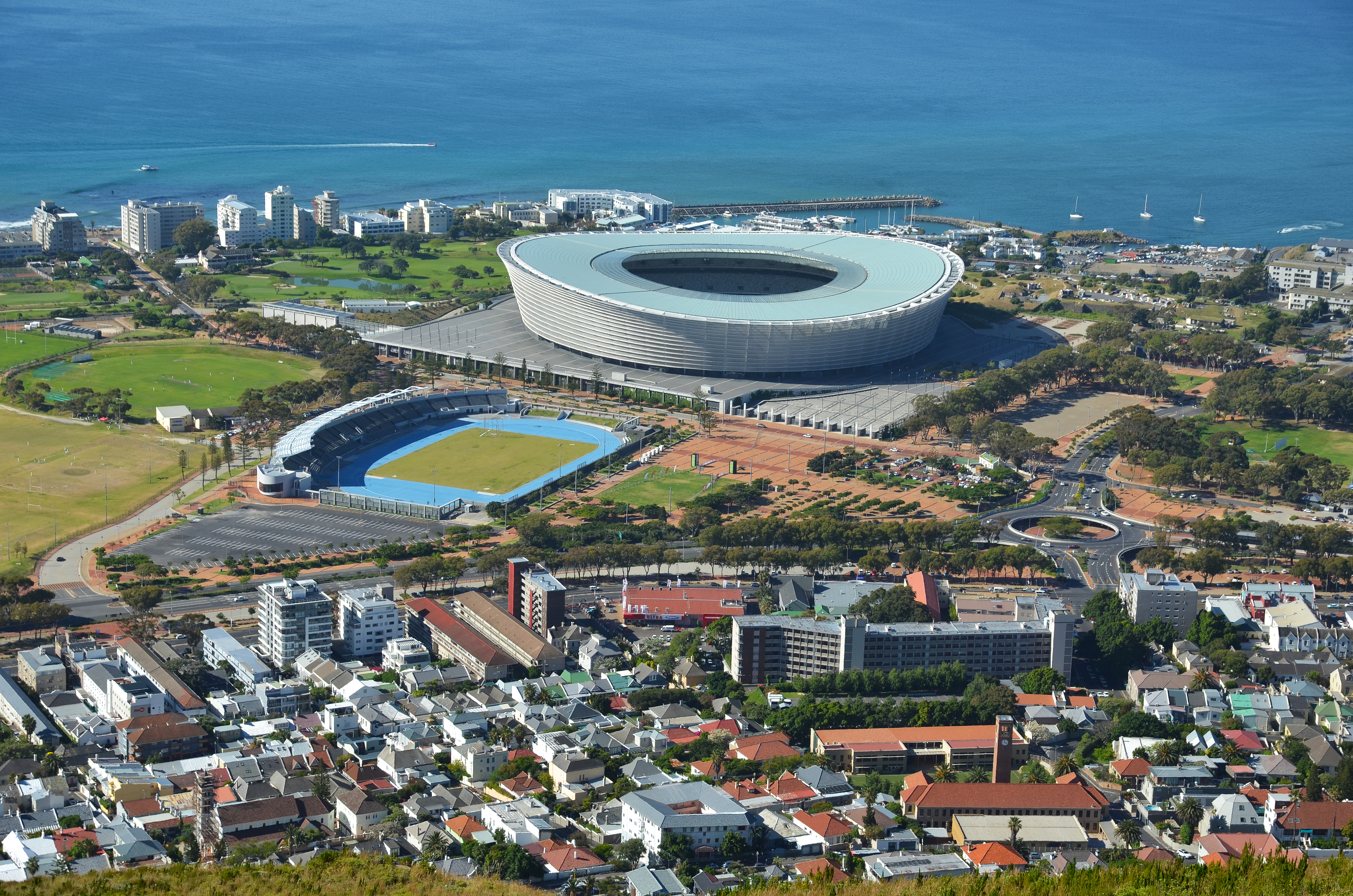 Kapské město, fotbalový stadion - Jihoafrická republika